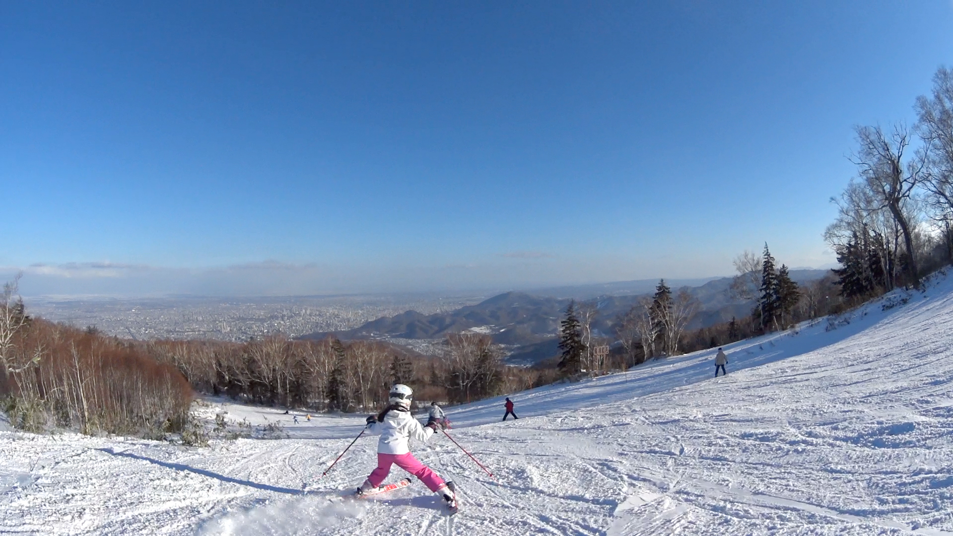 My daughter. 今シーズン初滑りは「サッポロテイネ」。 まだ雪が少なく、ハイランドゾーンのみ営業中。 @Sapporo Teine Ski Resort. (櫻子、8歳1ヶ月)